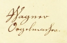 Signatur Joachim Wagner, "Orgelmacher"